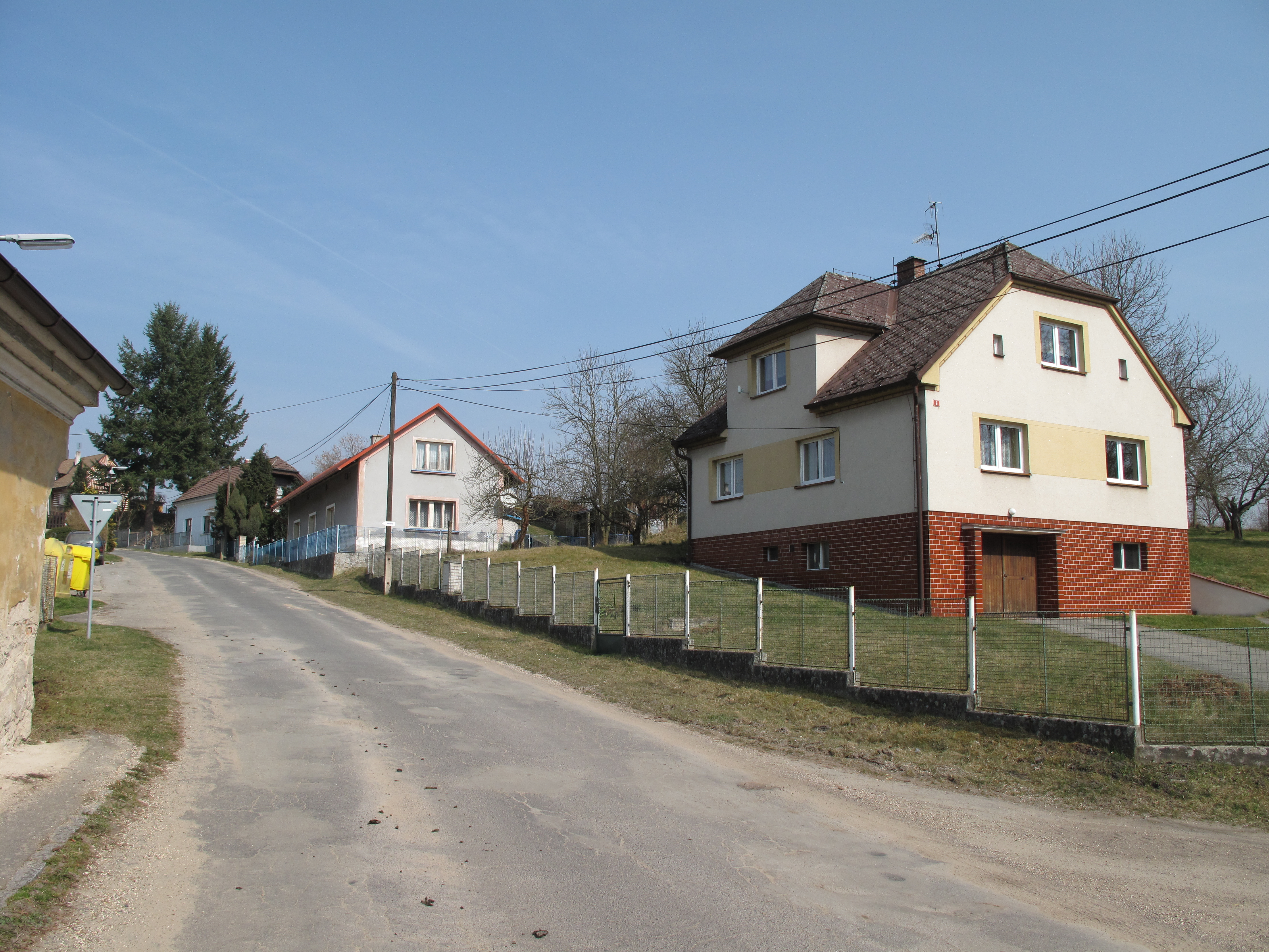 Silnice a domy v Borovici. Okres Mladá Boleslav, Česká republika.